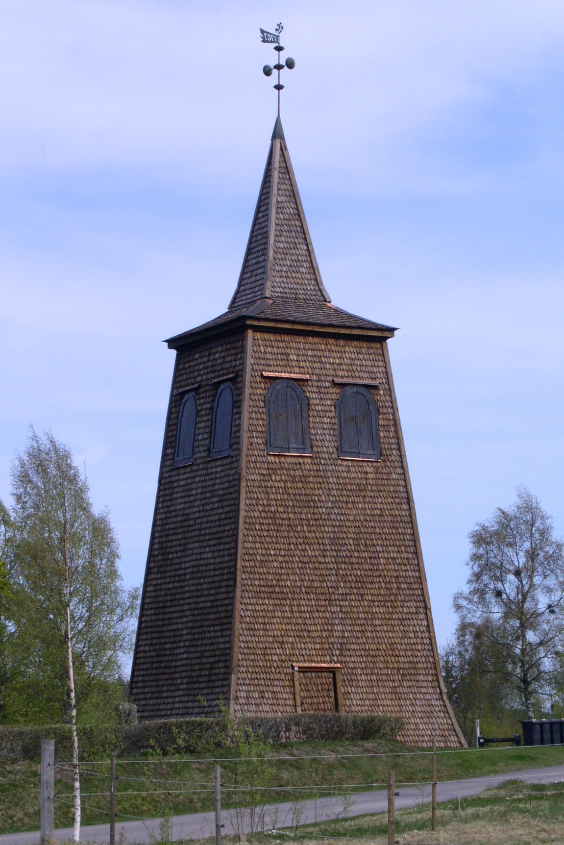 Säfsnäs kyrkas klockstapel